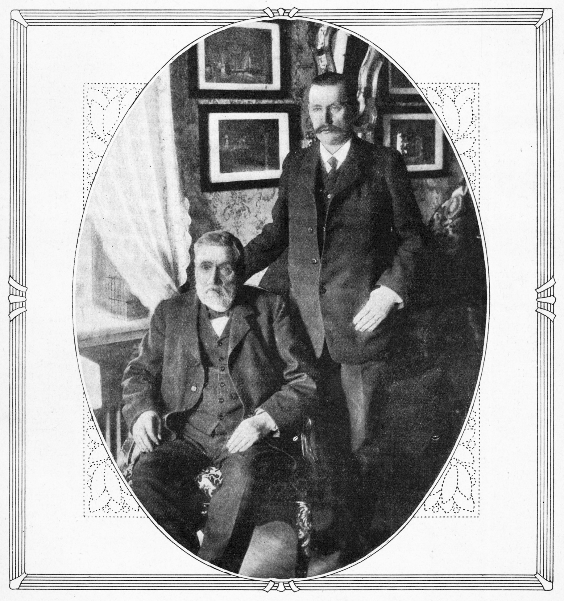 Antenor Nydqvist (1817-1914) och Herman Nydqvist (1862–1922) på omslaget till Hvar 8 Dag 1912.